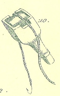 Teikning av Vadbein utførd av Hans Strøm 1862